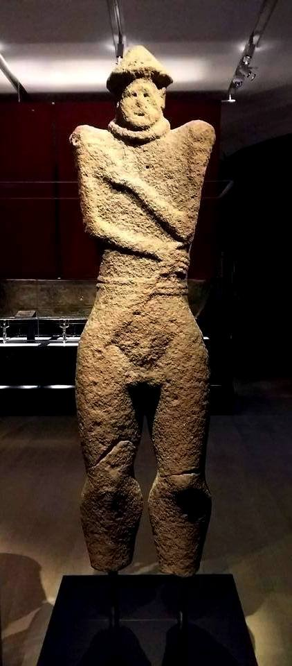 Krieger von Hirschlanden, Vorderseite, Württembergisches Landesmuseum Stuttgart